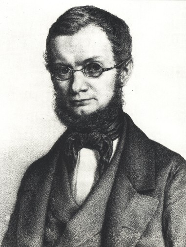 Portrait des Zoologen Emil Adolph Roßmäßler